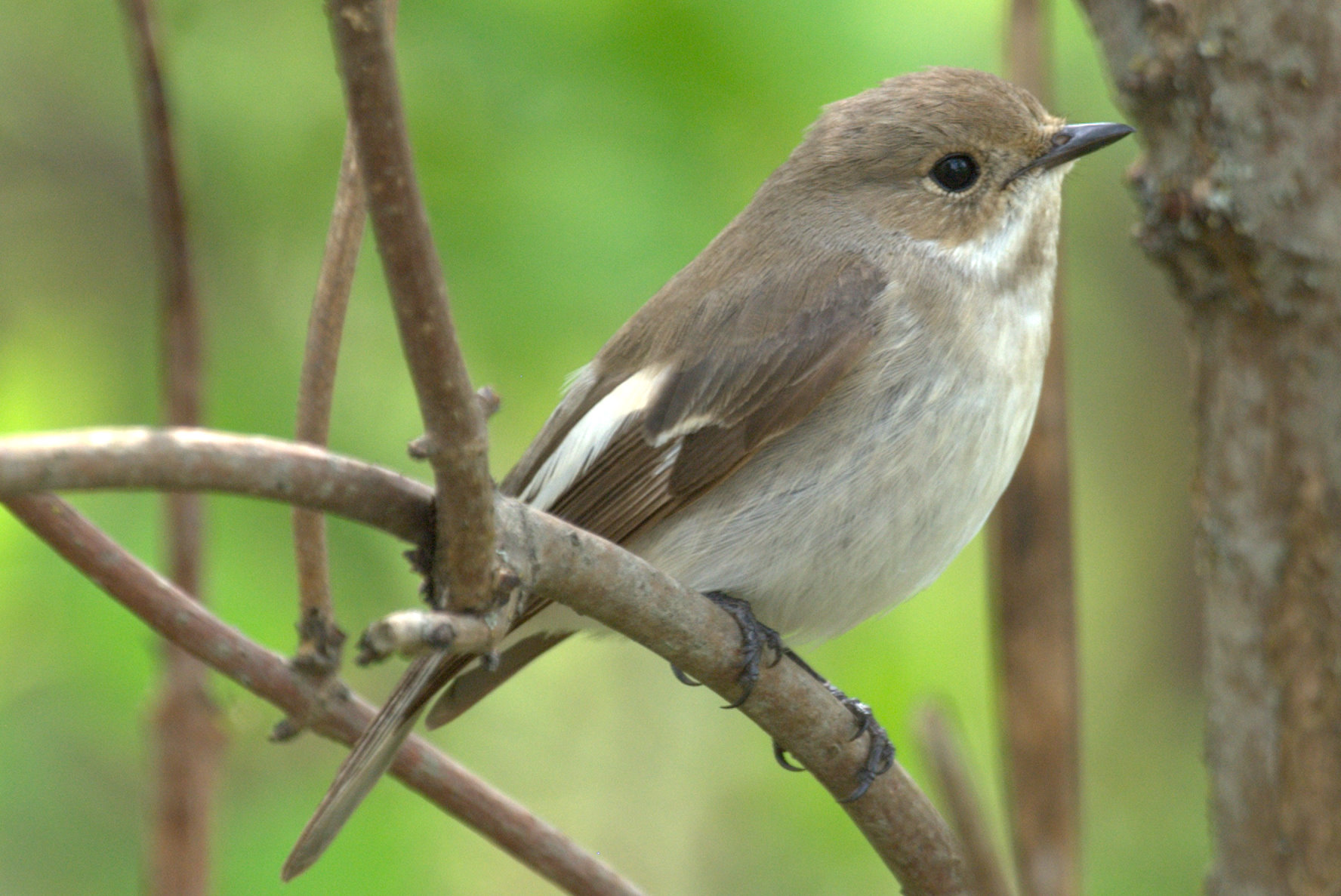 Kirjosiepponaaras Pälkäneellä.